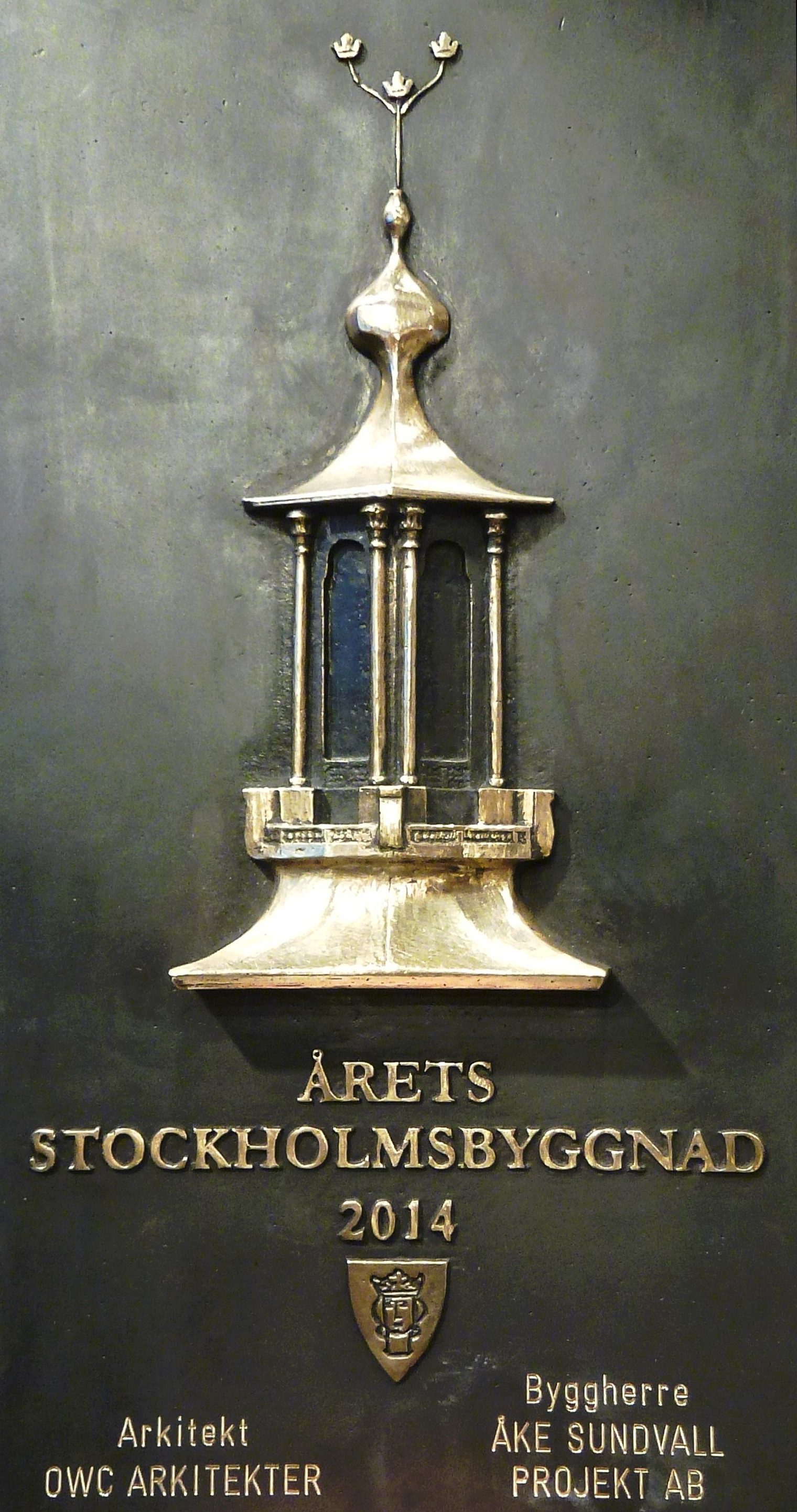 Årets Stockholmsbyggnad plakett 2014